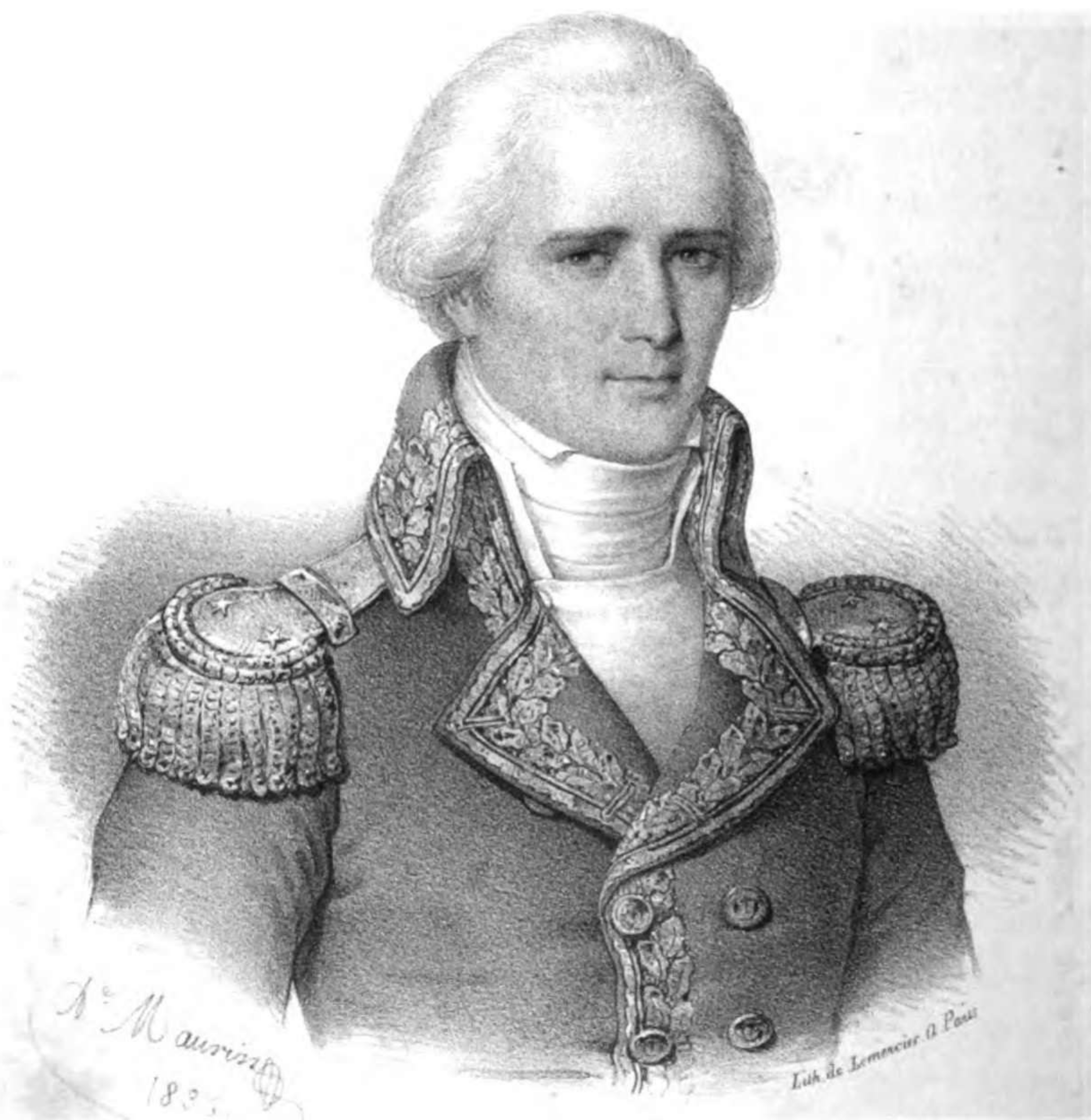 Pierre Jean Van Stabel